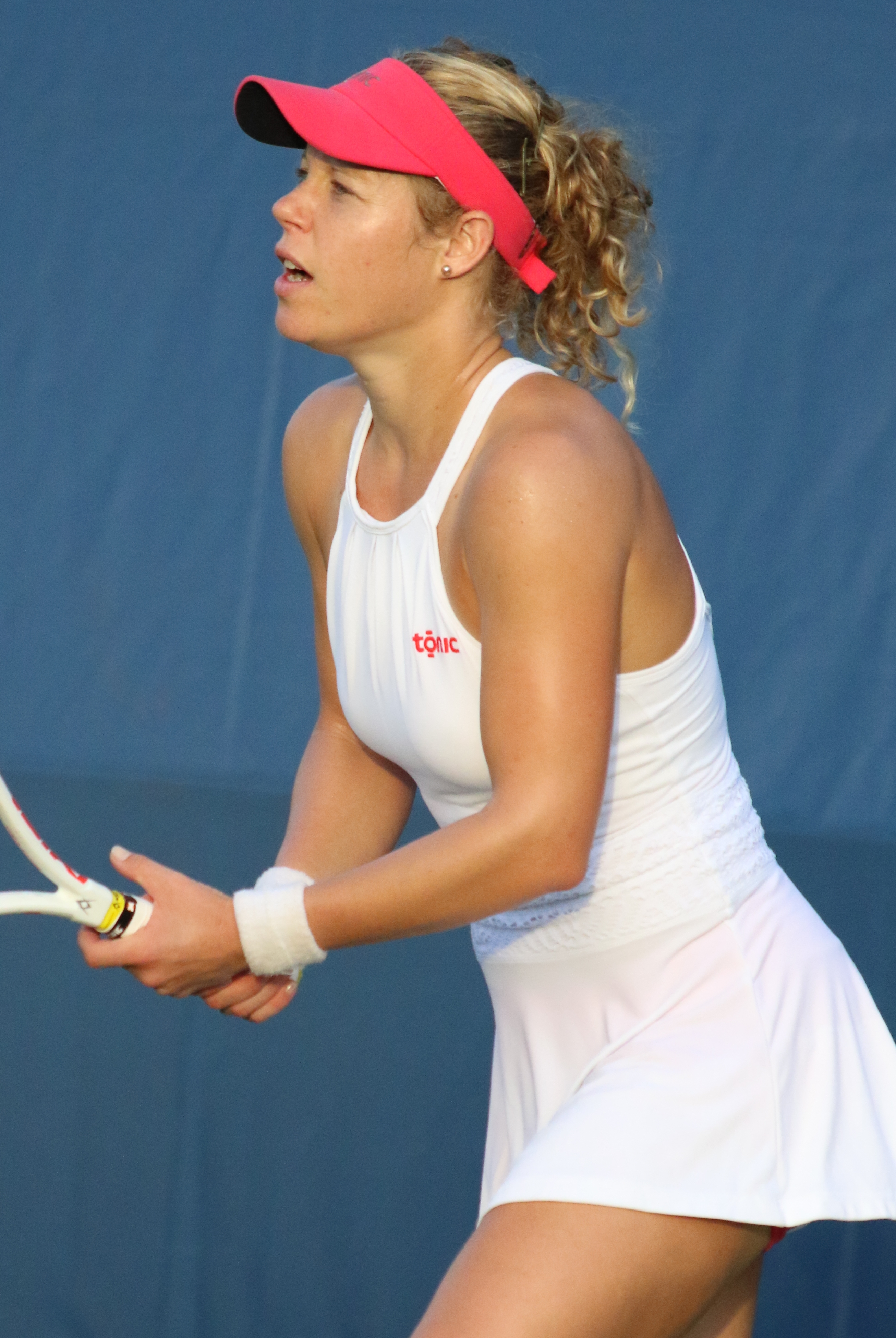 Siegemund US16 (15)